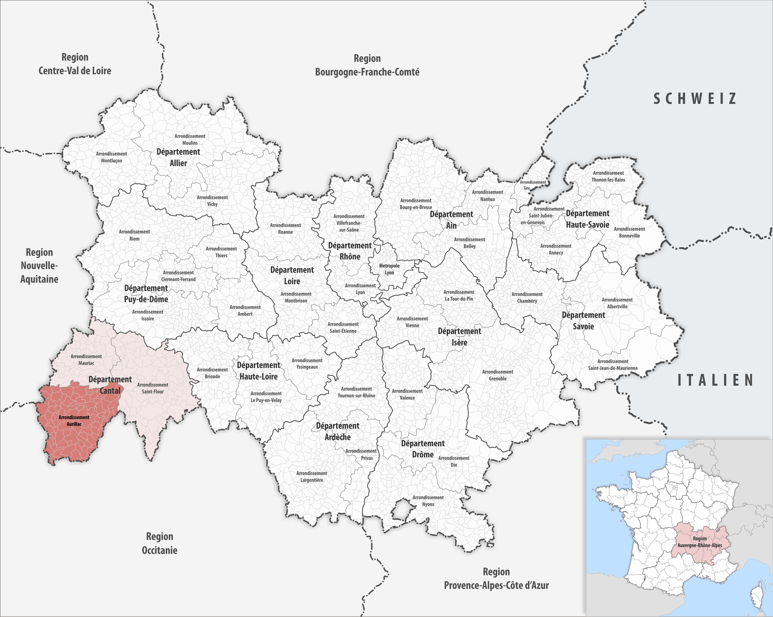 Lage des Arrondissements Aurillac